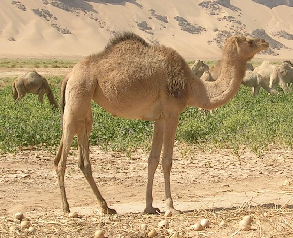 dromadaire maroc